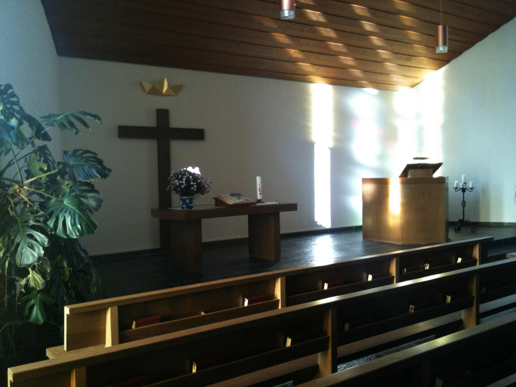 Innenraum der reformierten Bergkirche in Amden (Kanton St. Gallen)